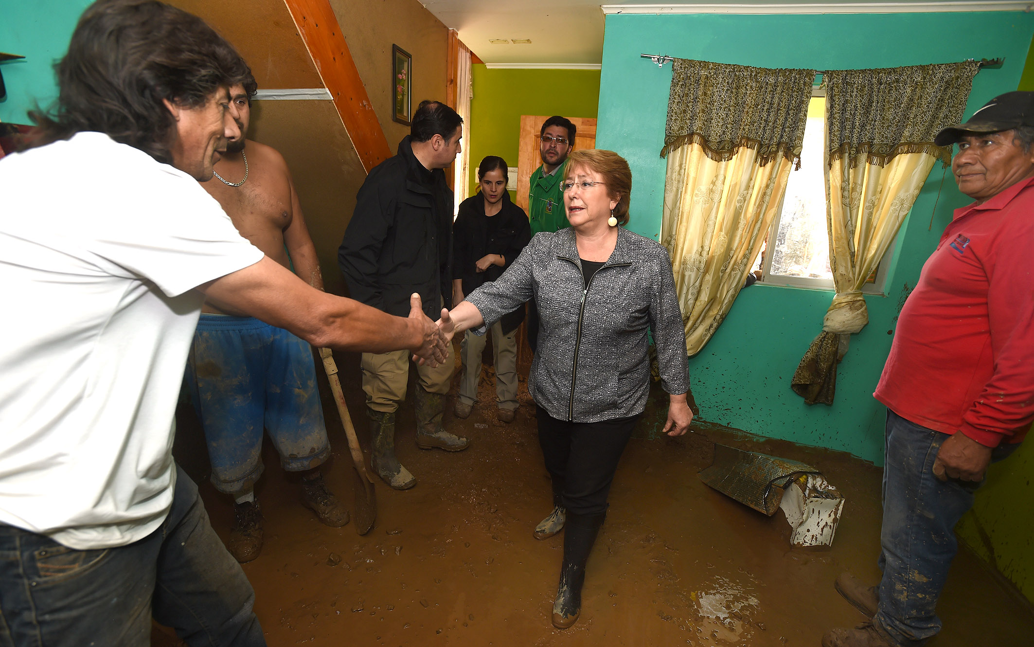 Gobierno de Chile